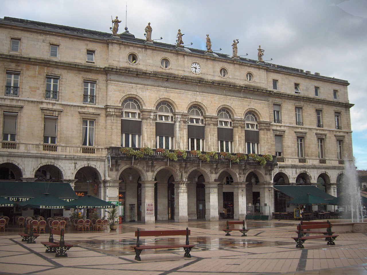 Town hall (Hôtel de Ville); Bayonne, France